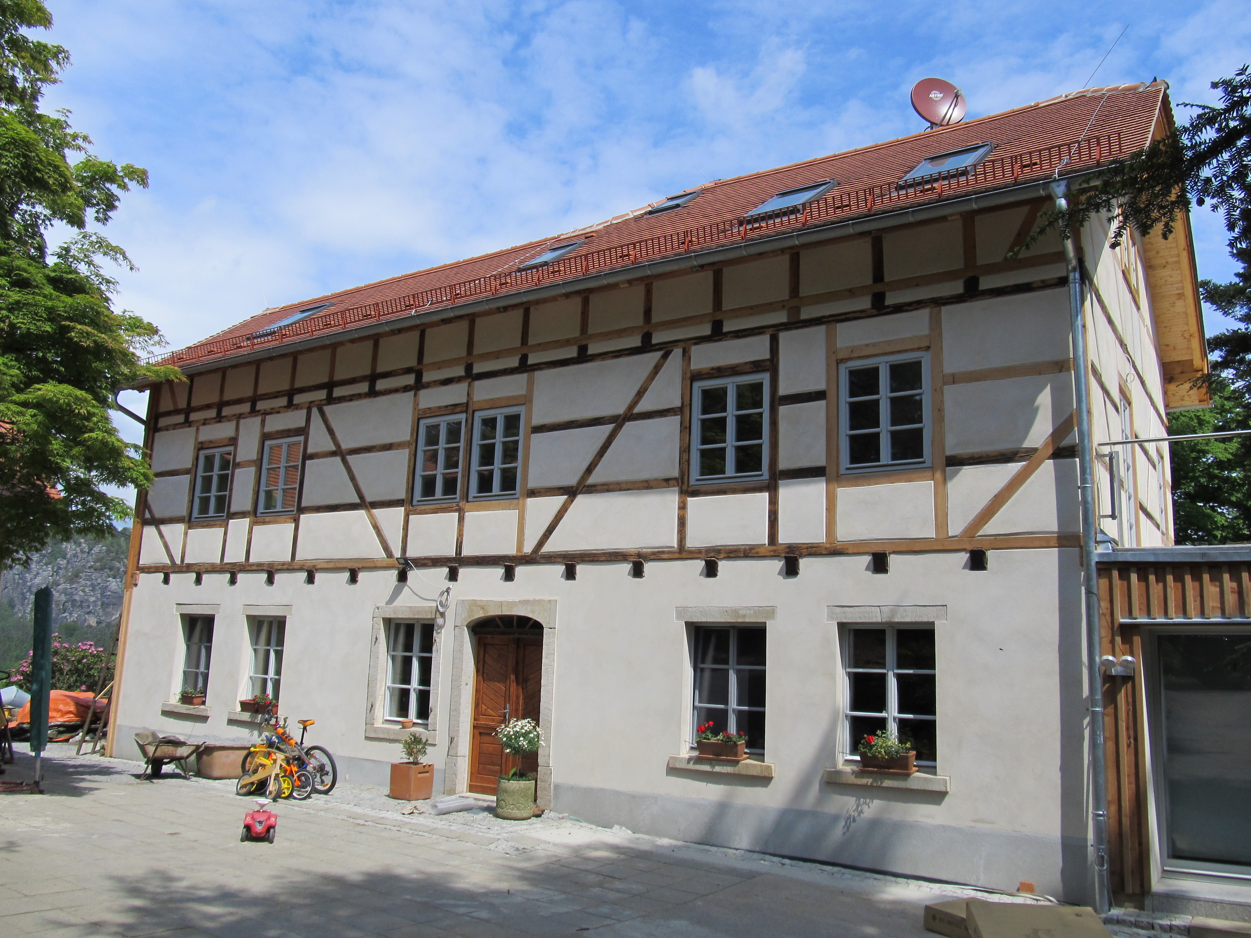 Ehem. Wohnhaus von Karl Friedrich Keydel im Rhododendronpark Kleine Bastei in Rathen nach der Restaurierung